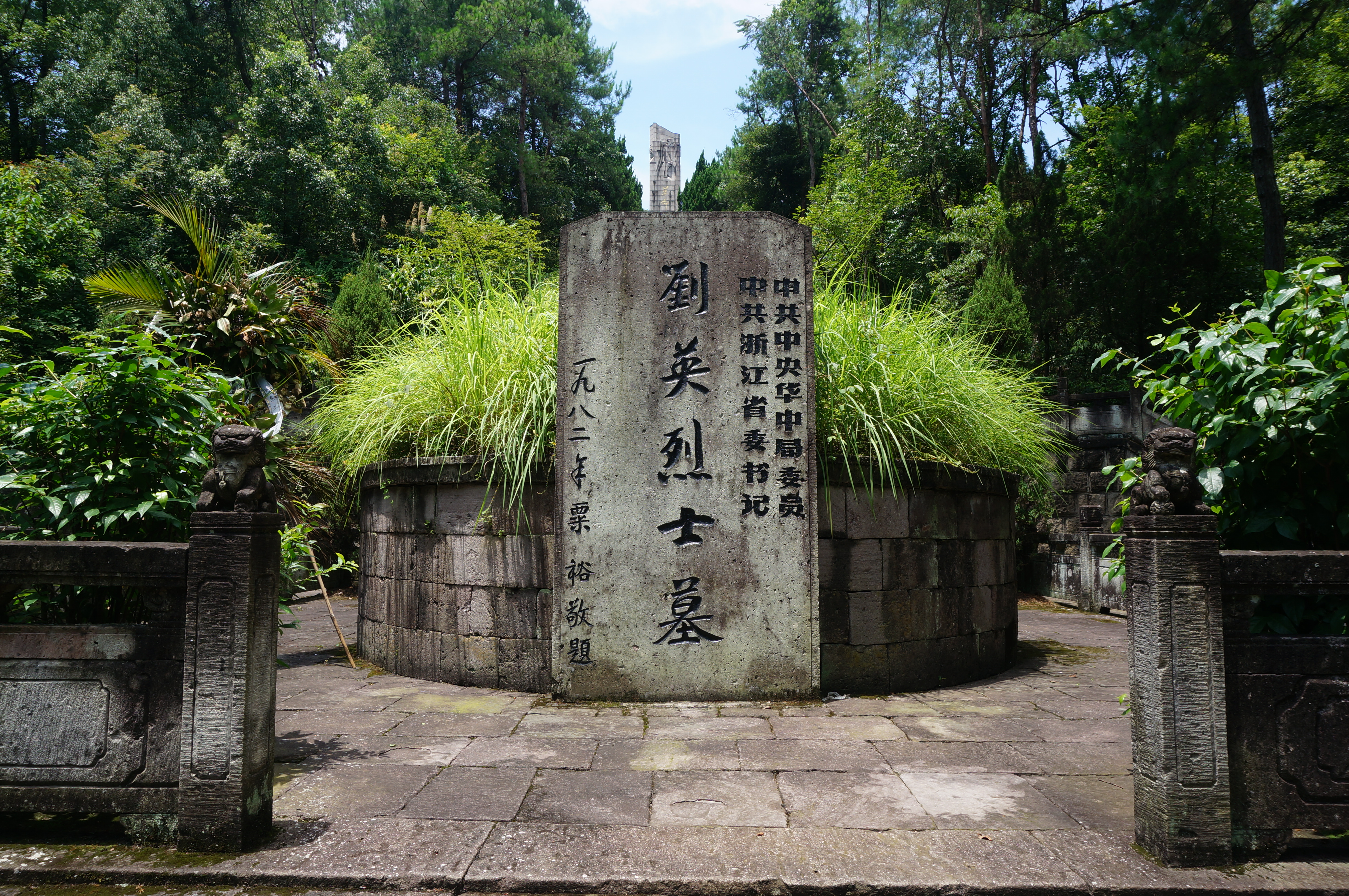 永康刘英墓，墓堆东面。